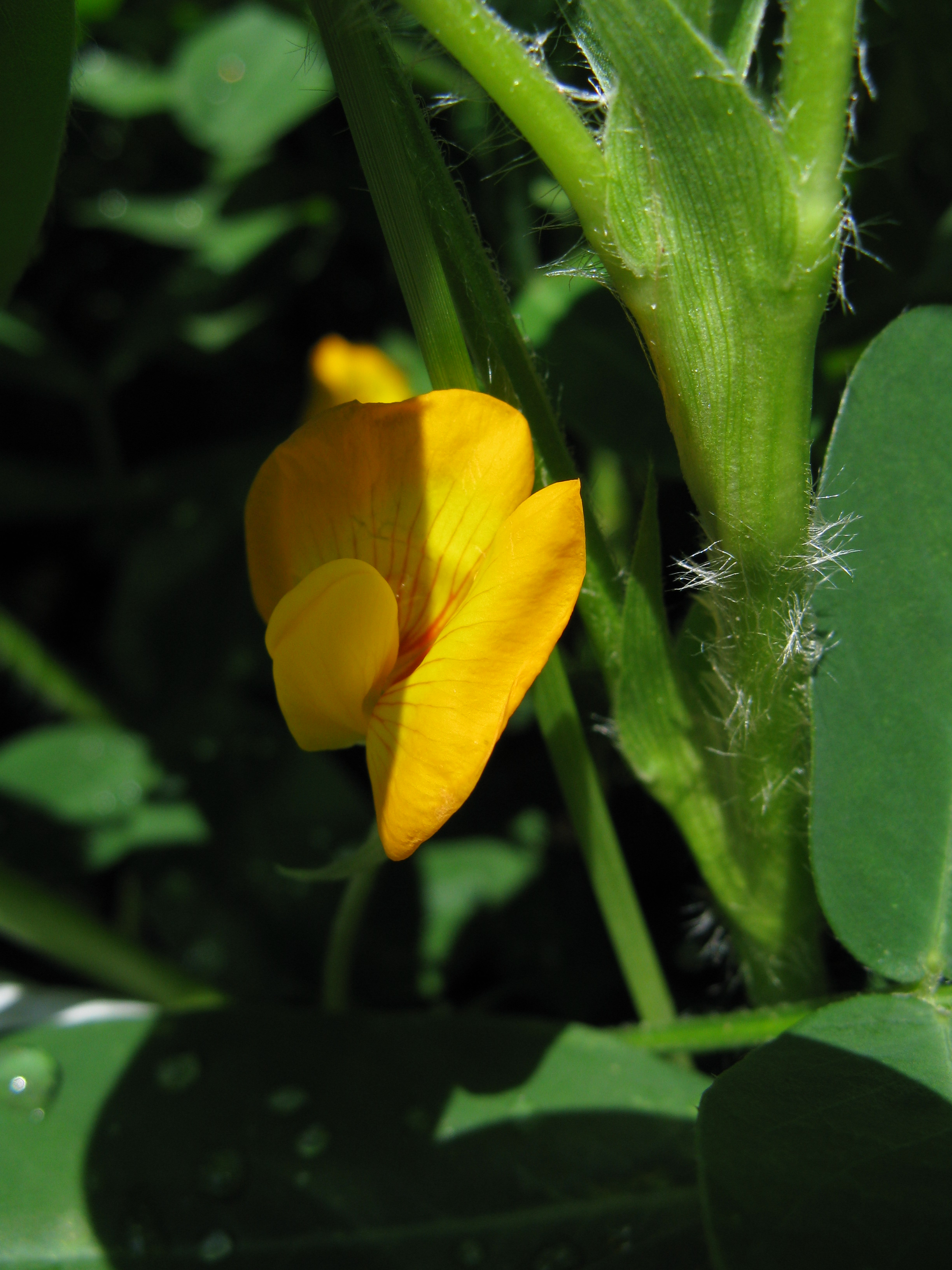 Arachis hypogaea